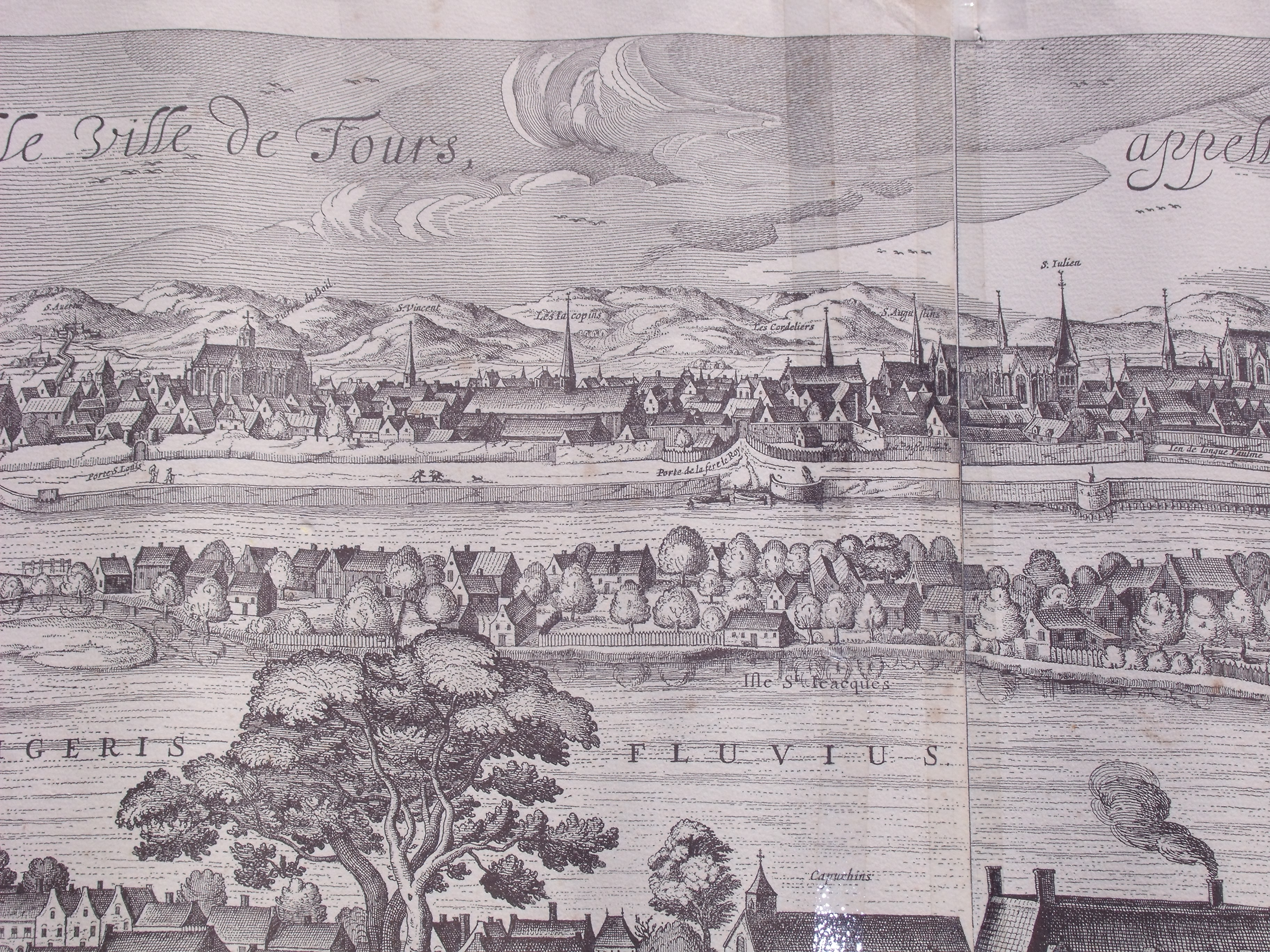 Quartier saint julien, extrait de l'estampe gravé par monsieur LAES JANSZ VISSCHER en 1625 tiré d'un original sur vélin de 2.35 m sur 41 cm, propriété de desprez37